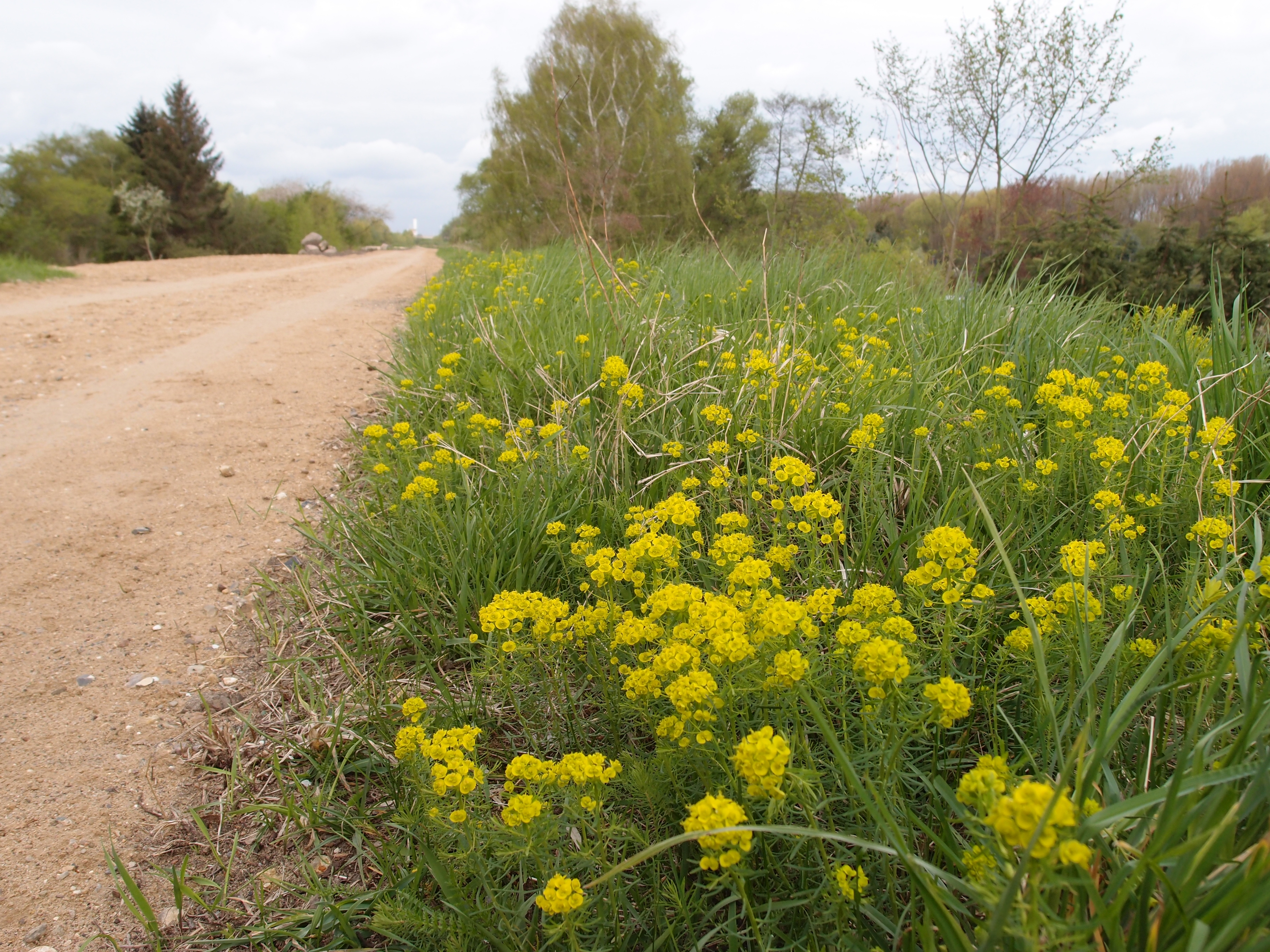 Zypressen-Wolfsmilch (Euphorbia cyparissias) auf dem Alten Billwerder Bahndamm